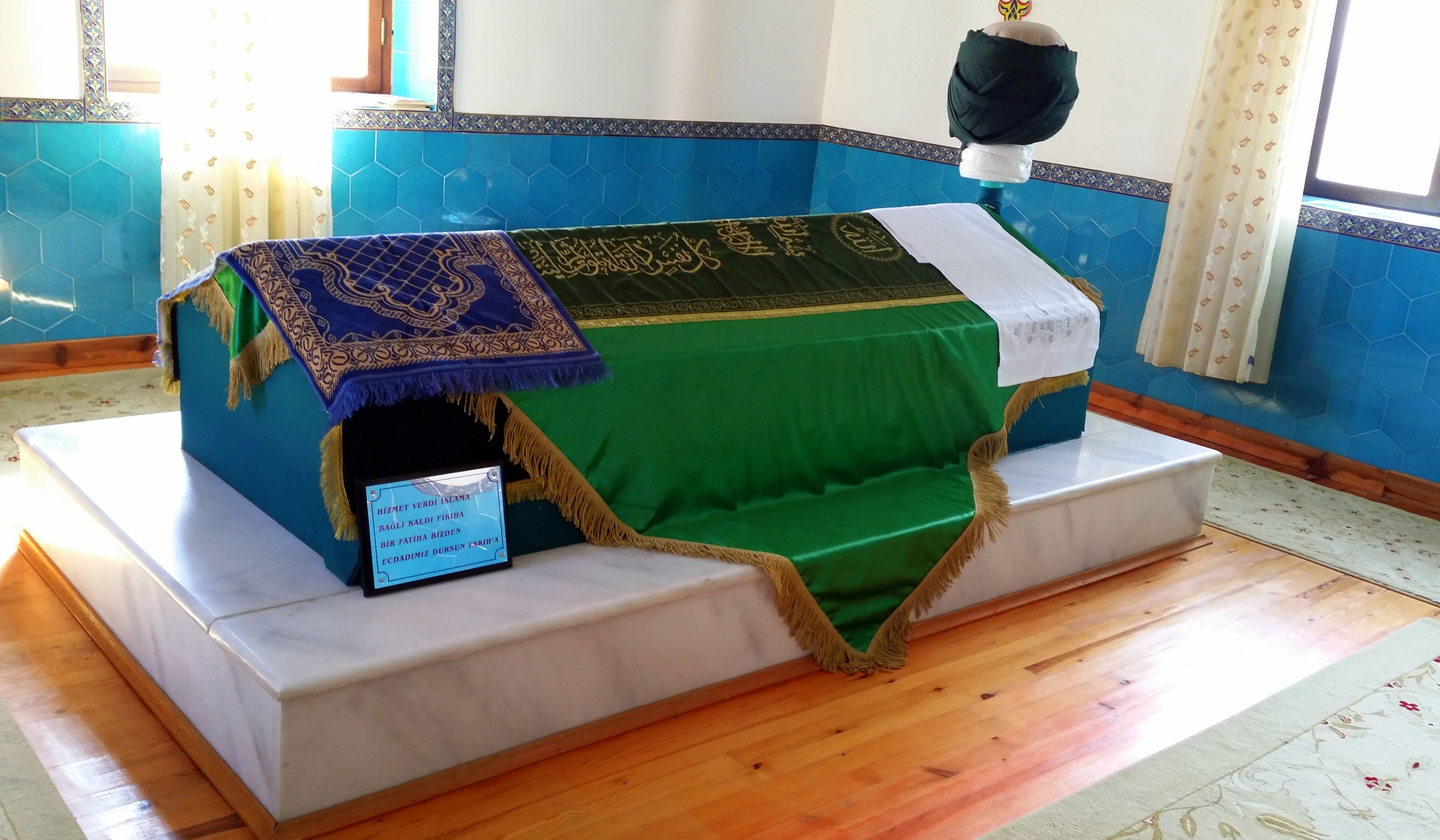 Dursun Fakıh mezarı